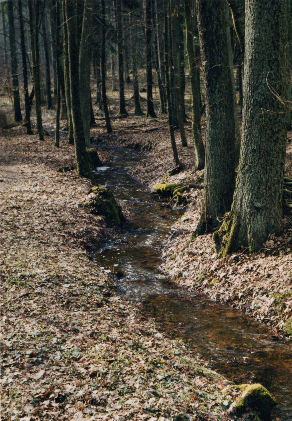 Autor: Adrian Grzegorz Rok wykonania: 2001